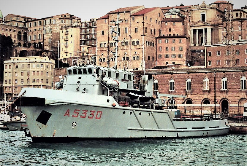 Rimorchiatore d'altura Saturno